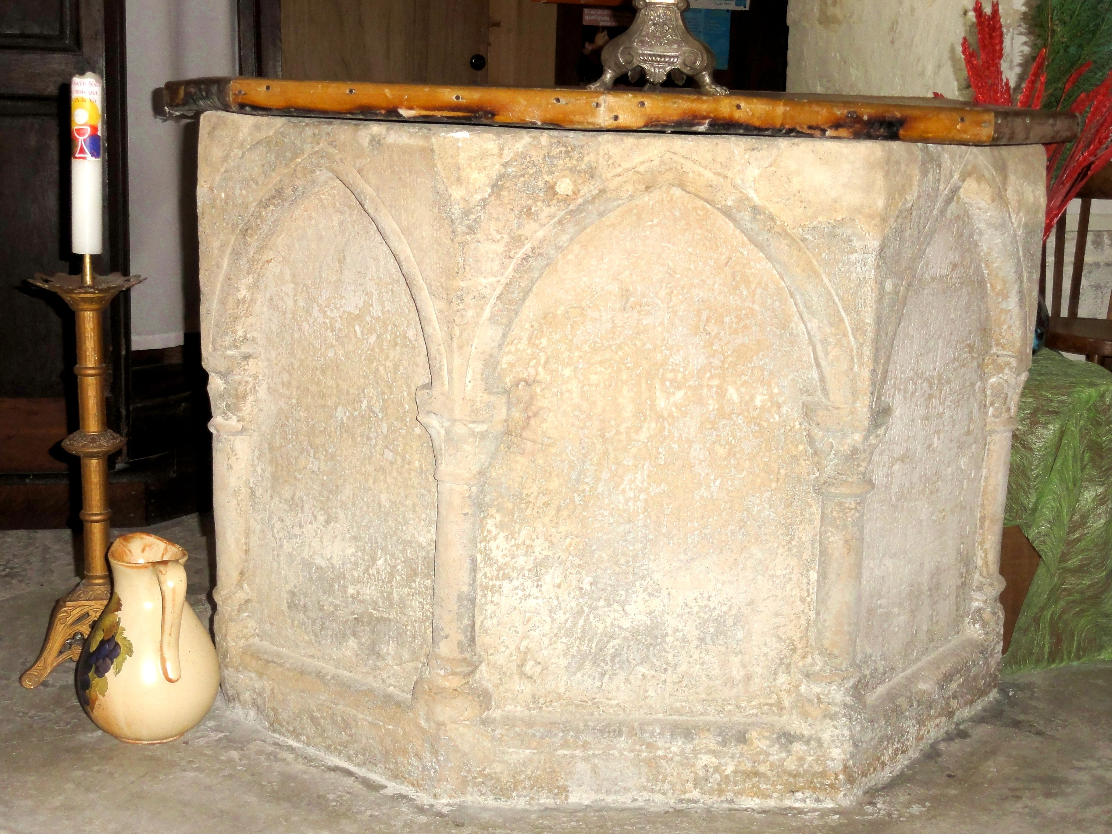 Bas-côté sud, fonts baptismaux, début XIIIe s.